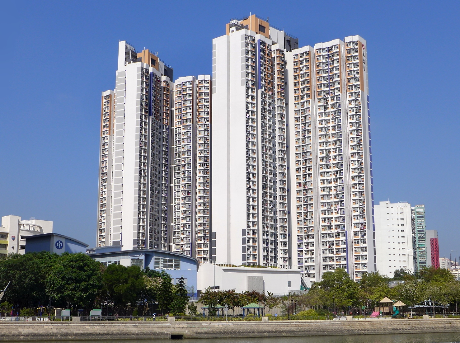 Lung Yat Estate